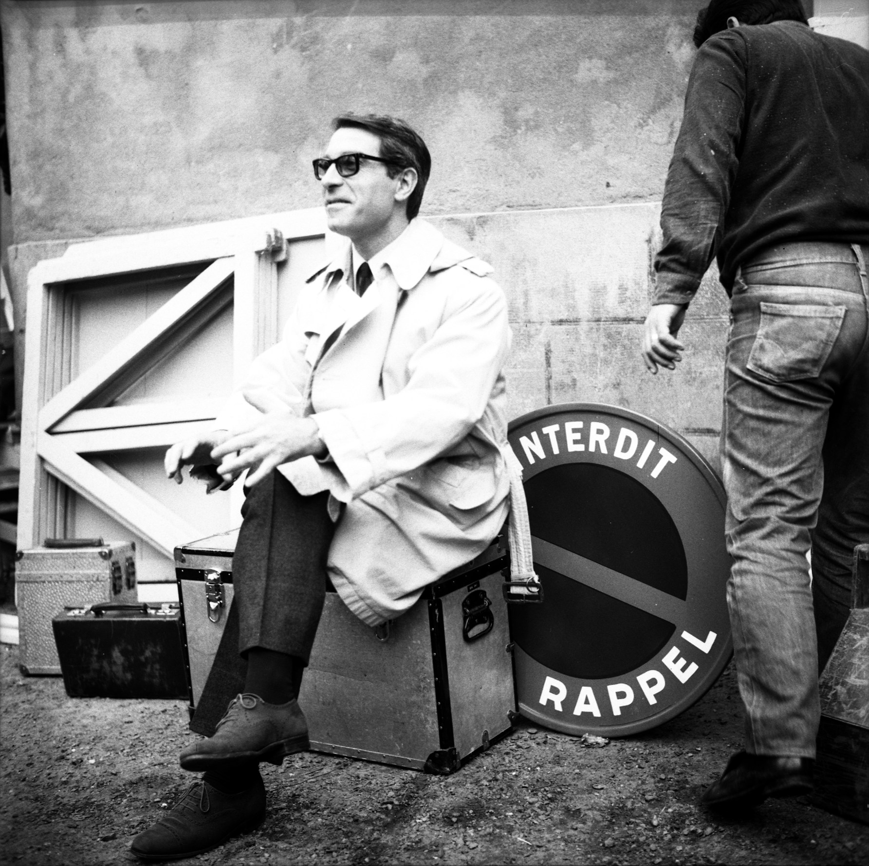 Quartier Saint-Sernin. Le 2 novembre 1965. Vue de Jean Poiret sur le tournage du film "La Bourse ou la Vie" de Jean Pierre Mocky. Observation: Tournage du film "La Bourse ou la Vie" de Jean Pierre Mocky, dans le quartier de St Sernin.